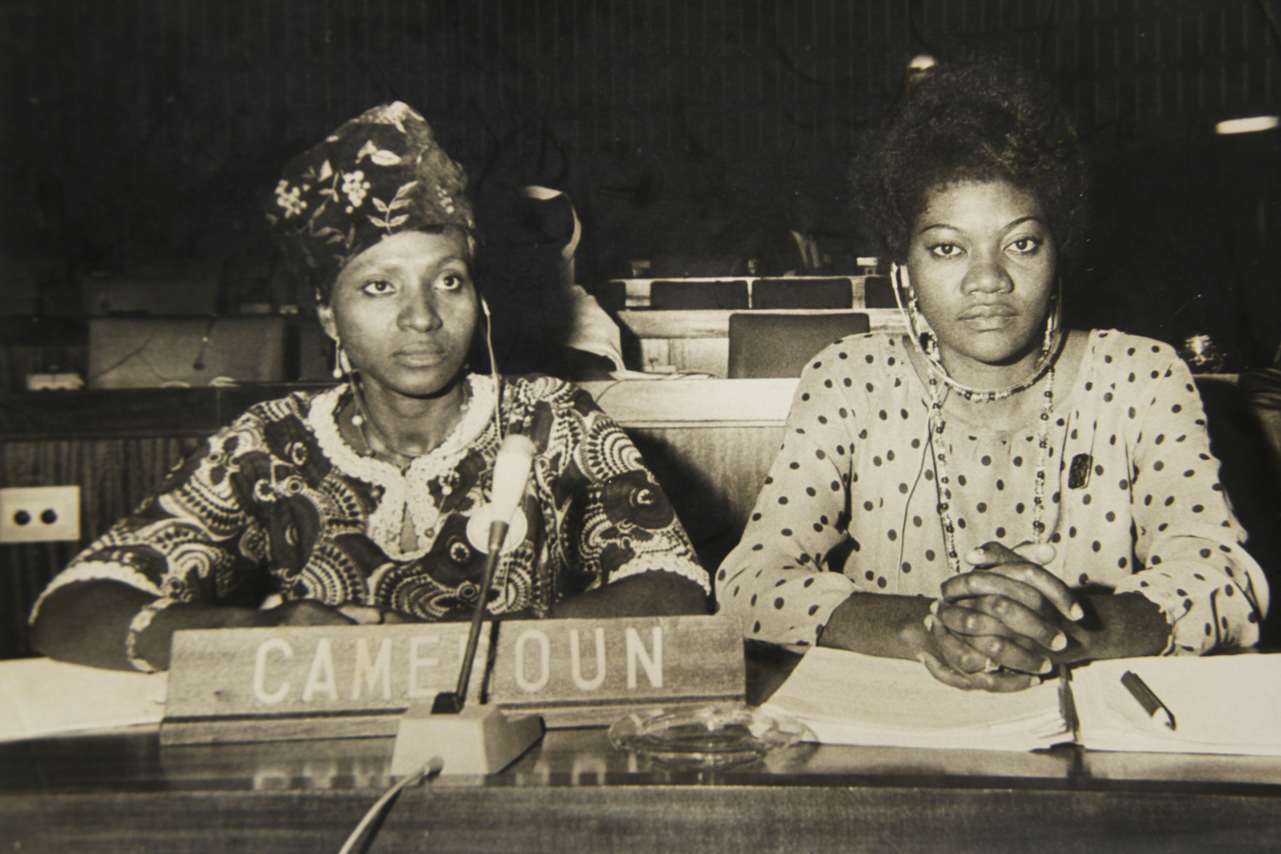 A Alger avec le ministre Delphine Tsanga